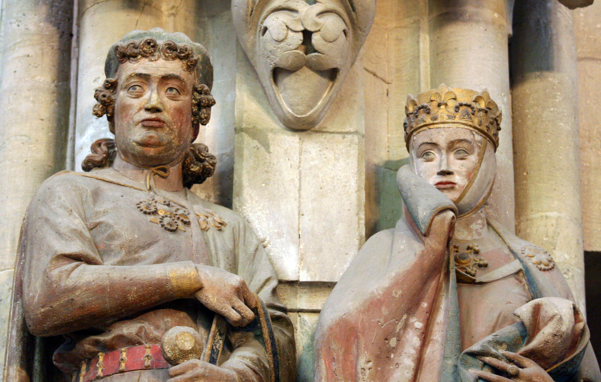 Uta and Ekkehard in Naumburger Dom